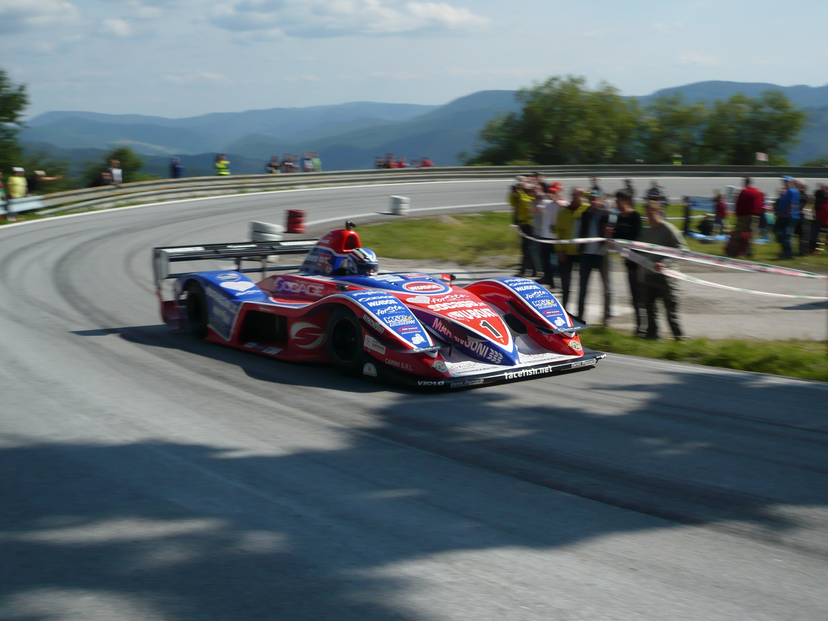 Osella FA30 Simoneho Faggioliho na ME PAV Dobšinský kopec 2012